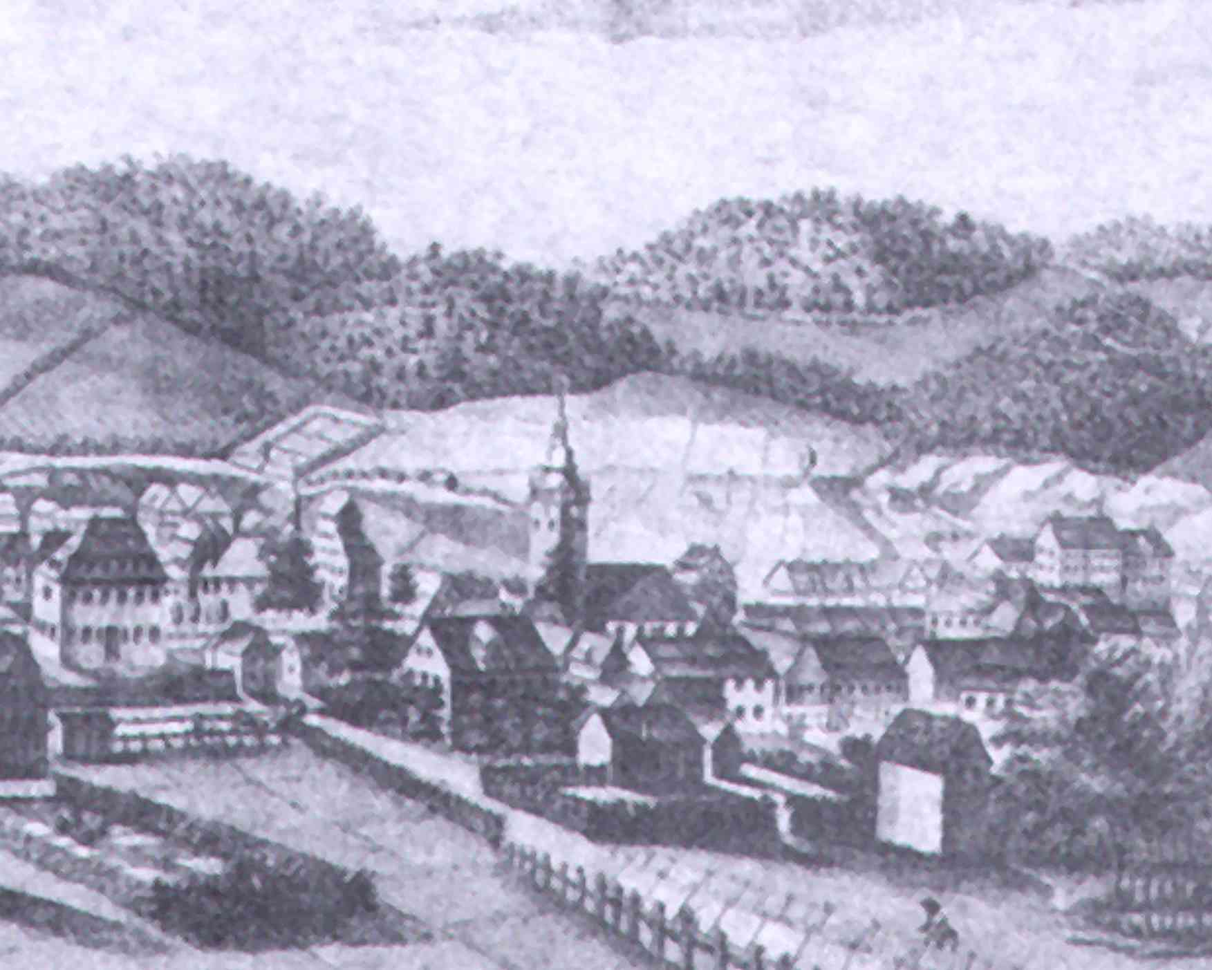 Bildbeschreibung: Gemarke mit erster Gemarker Kirche, 1788 Quelle: selbst gescannt